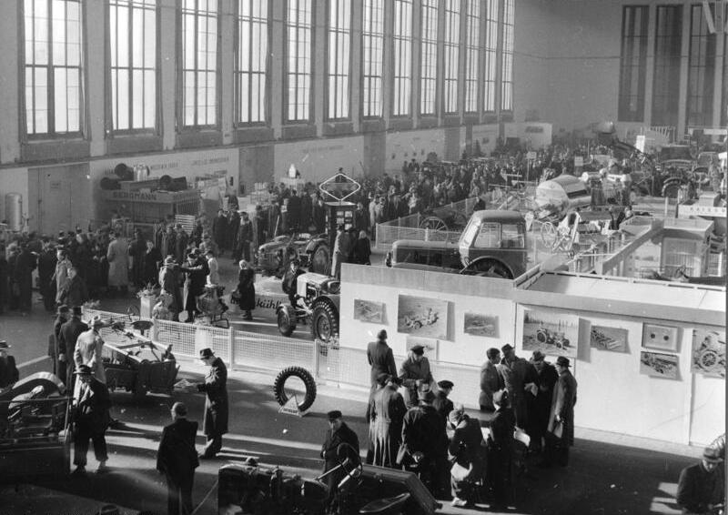 Landwirtschaftsausstellung "Grüne Woche" in Berlin, 28.1.54